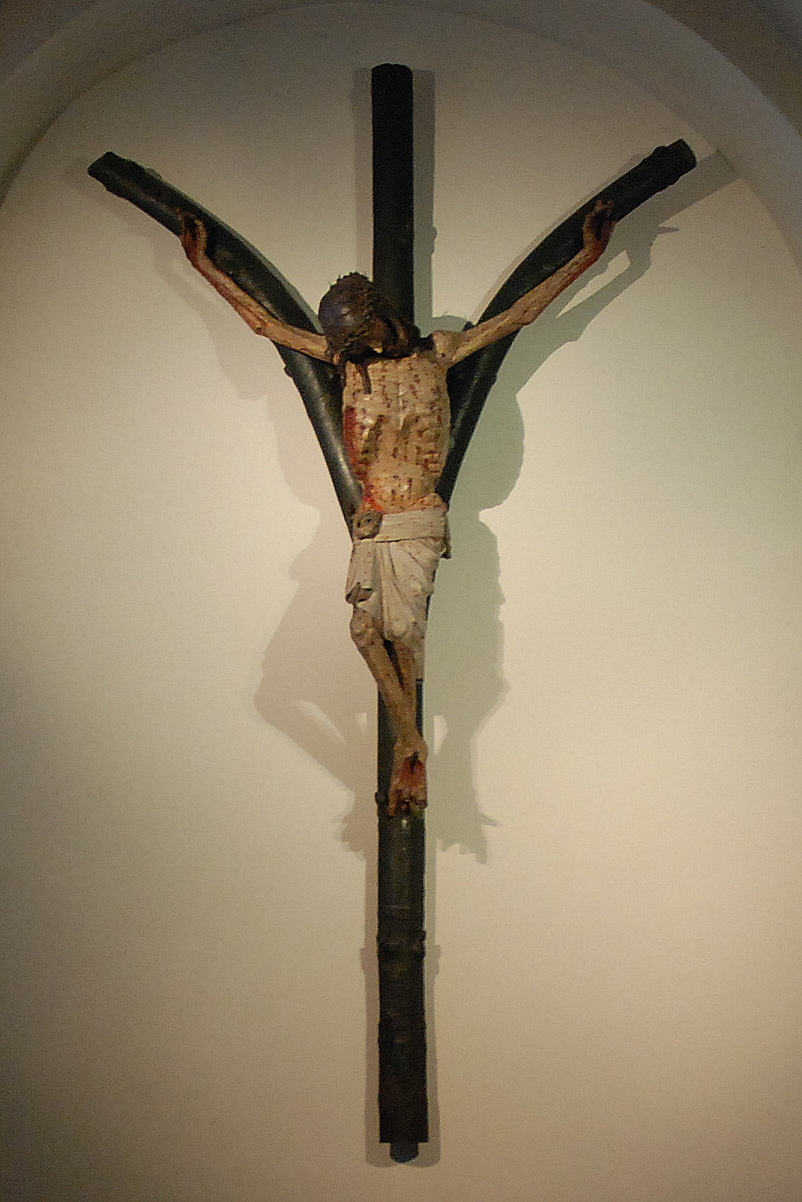 Het 14e-eeuws crucifix in de kerk van de Heilige Maria in het Capitool te Keulen (Duitsland)